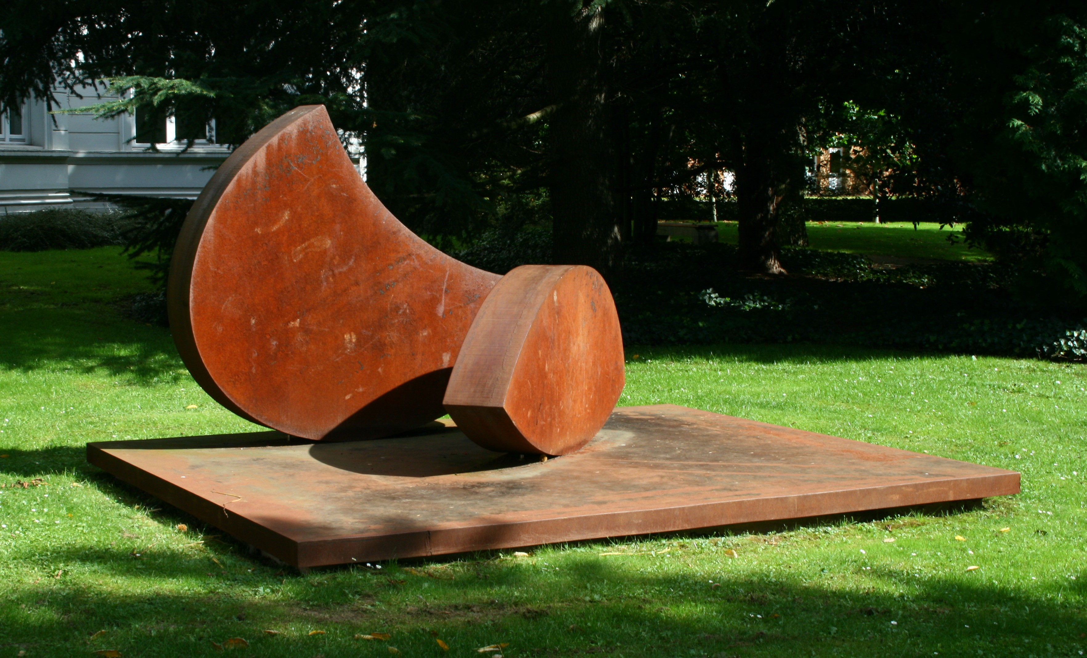 Skulptur "Position im Schwerpunkt" in der Skulpturensammlung Viersen. Selbst fotografiert.